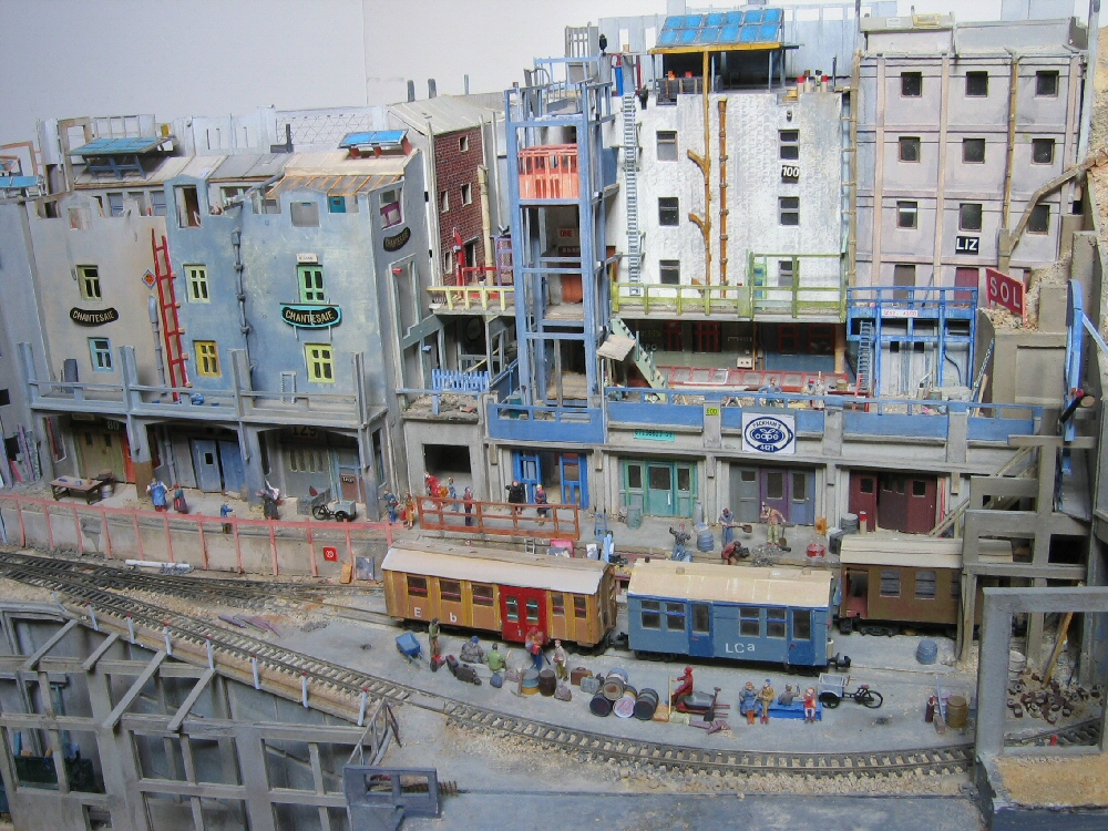 ReFeRe : gare en pleine ville, au-delà du KM 7